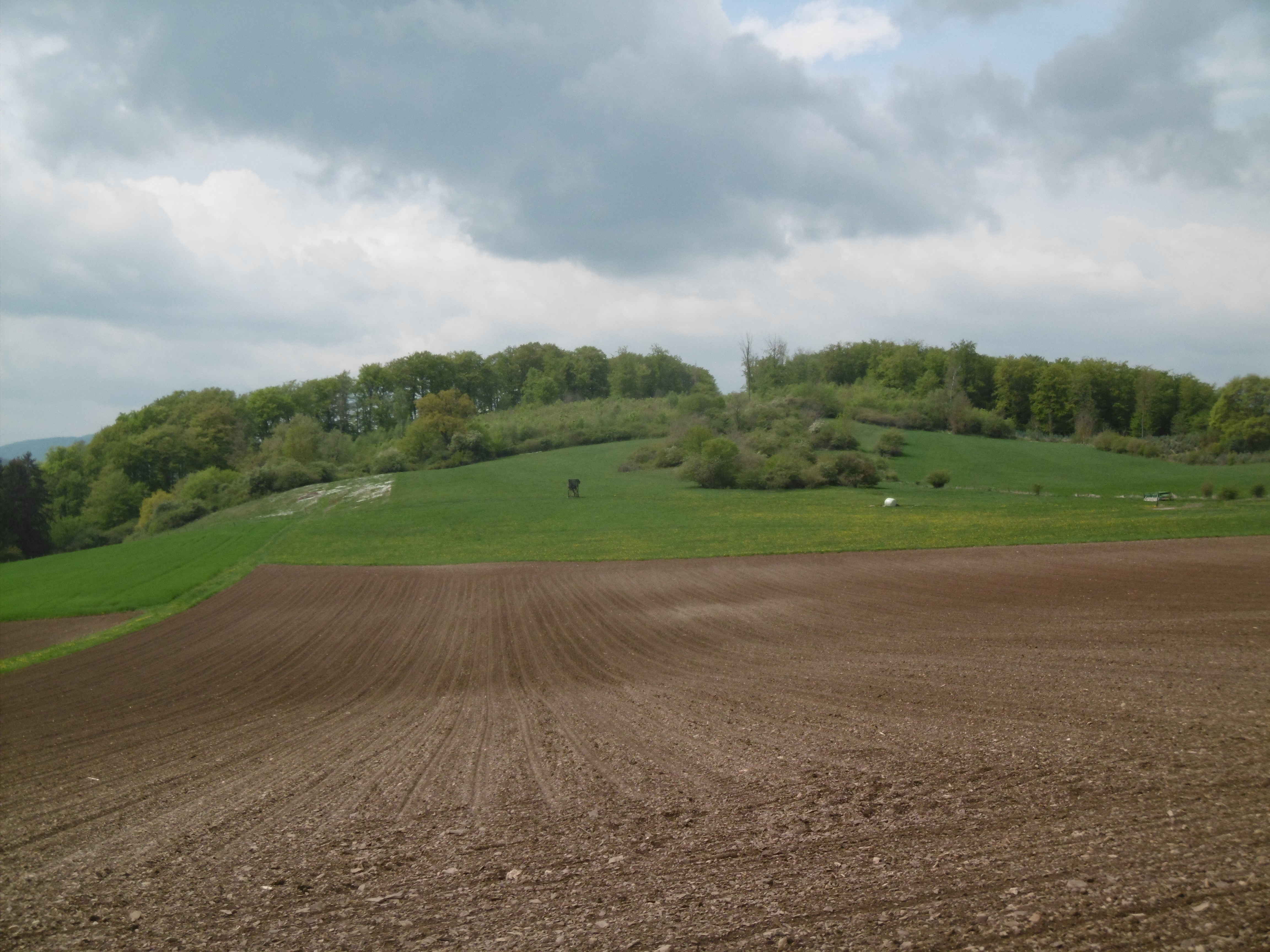 Naturschutzgebiet Östlicher Arnstein Grünland am Hang und Gebüschbereich zwischen Grünland.